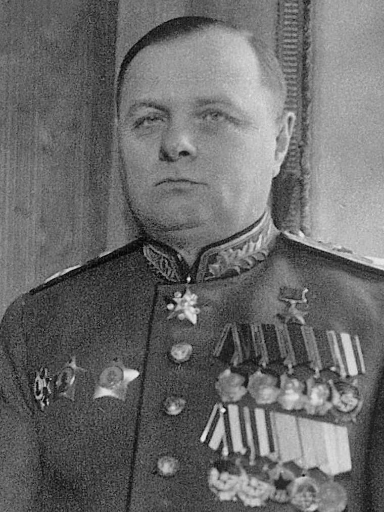 Маршал Советского Союза Герой Советского Союза Кирилл Афанасьевич Мерецков с сыном Владимиром, гвардии майором, слушателем Академии бронетанковых и механизированных войск, перед отъездом на Дальний Восток